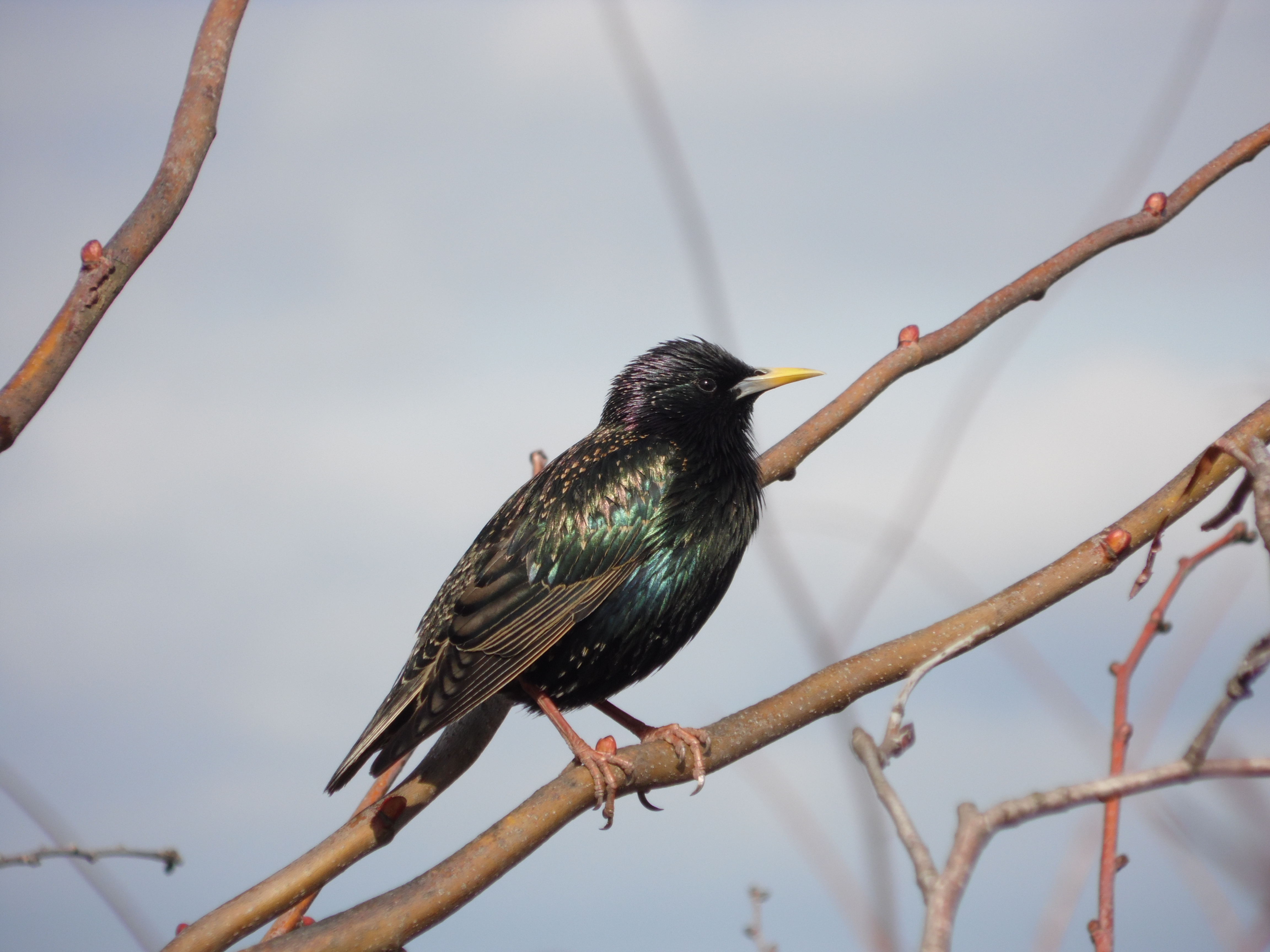 Шпак звичайний навесні